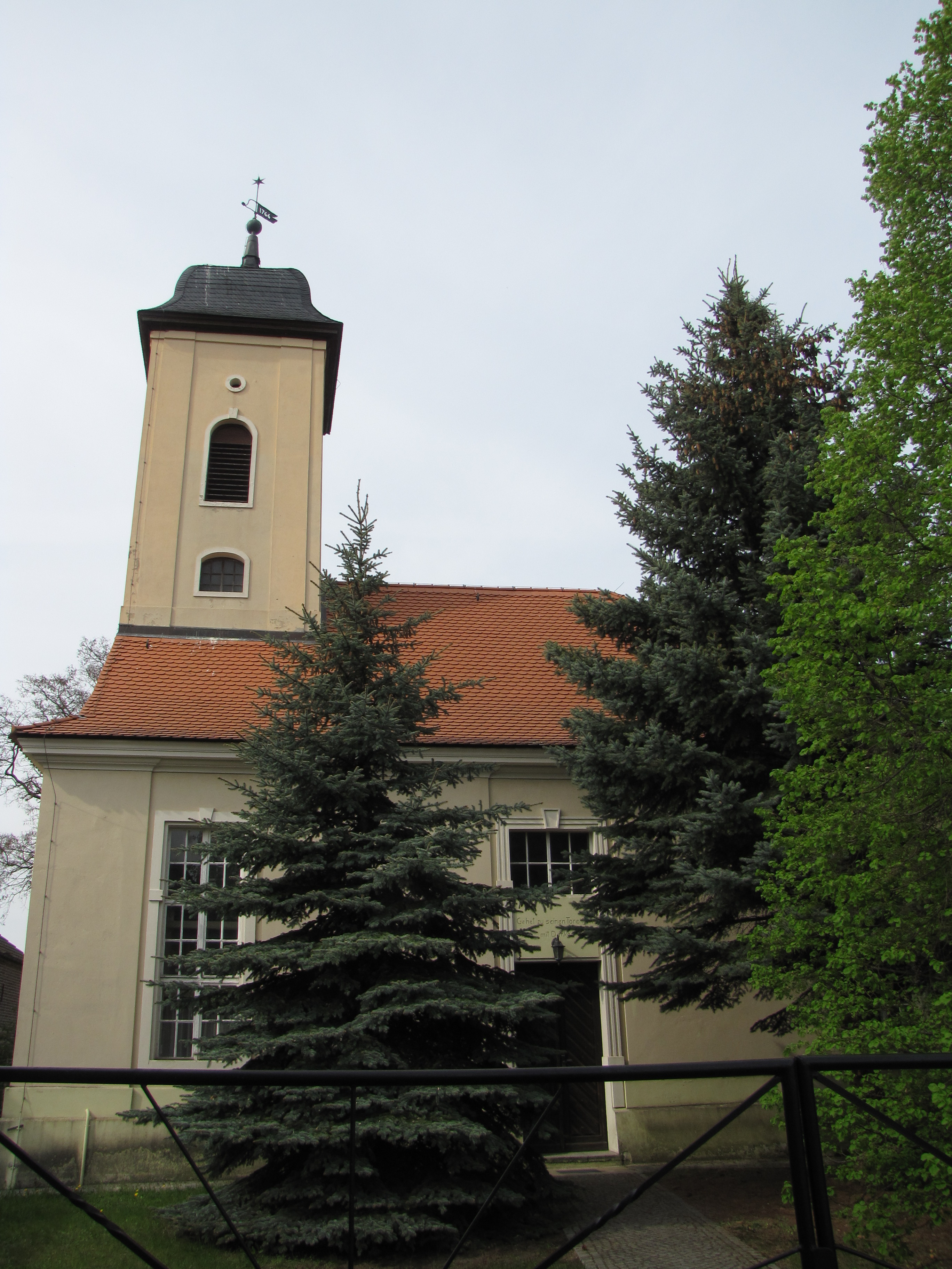 Dorfkirche in Schünow, Stadt Zossen, Brandenburg, Deutschland